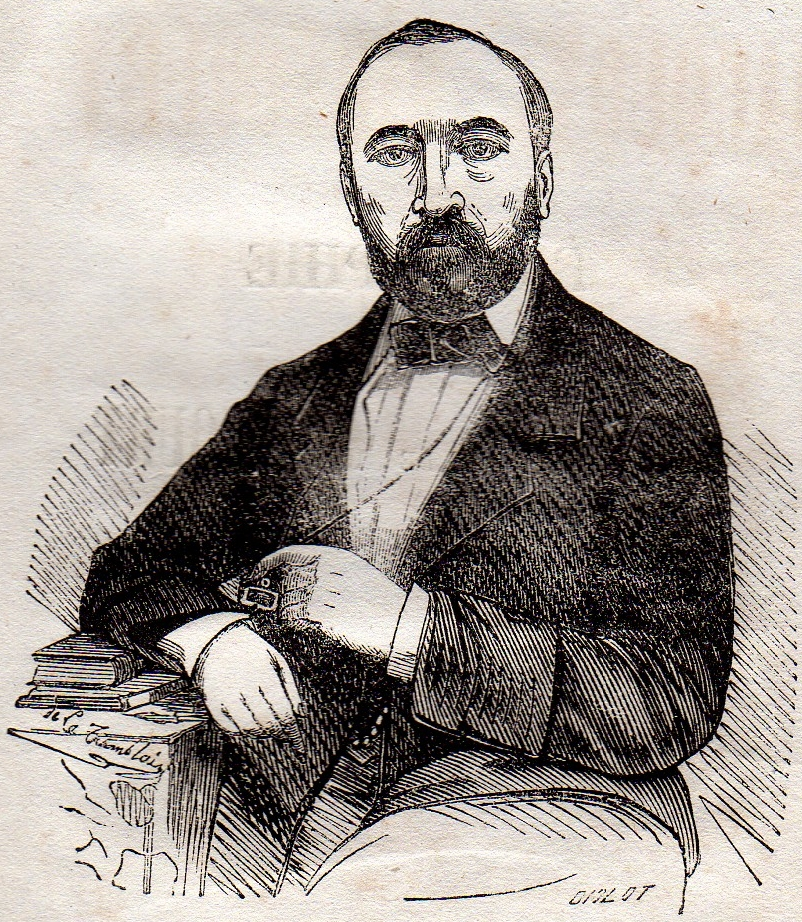 gravure représentant Eugène de Mirecourt